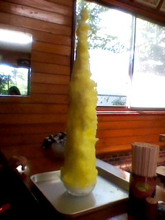 Japoński deser z kruszonego na drobno lodu, polanego różnego rodzaju syropami.